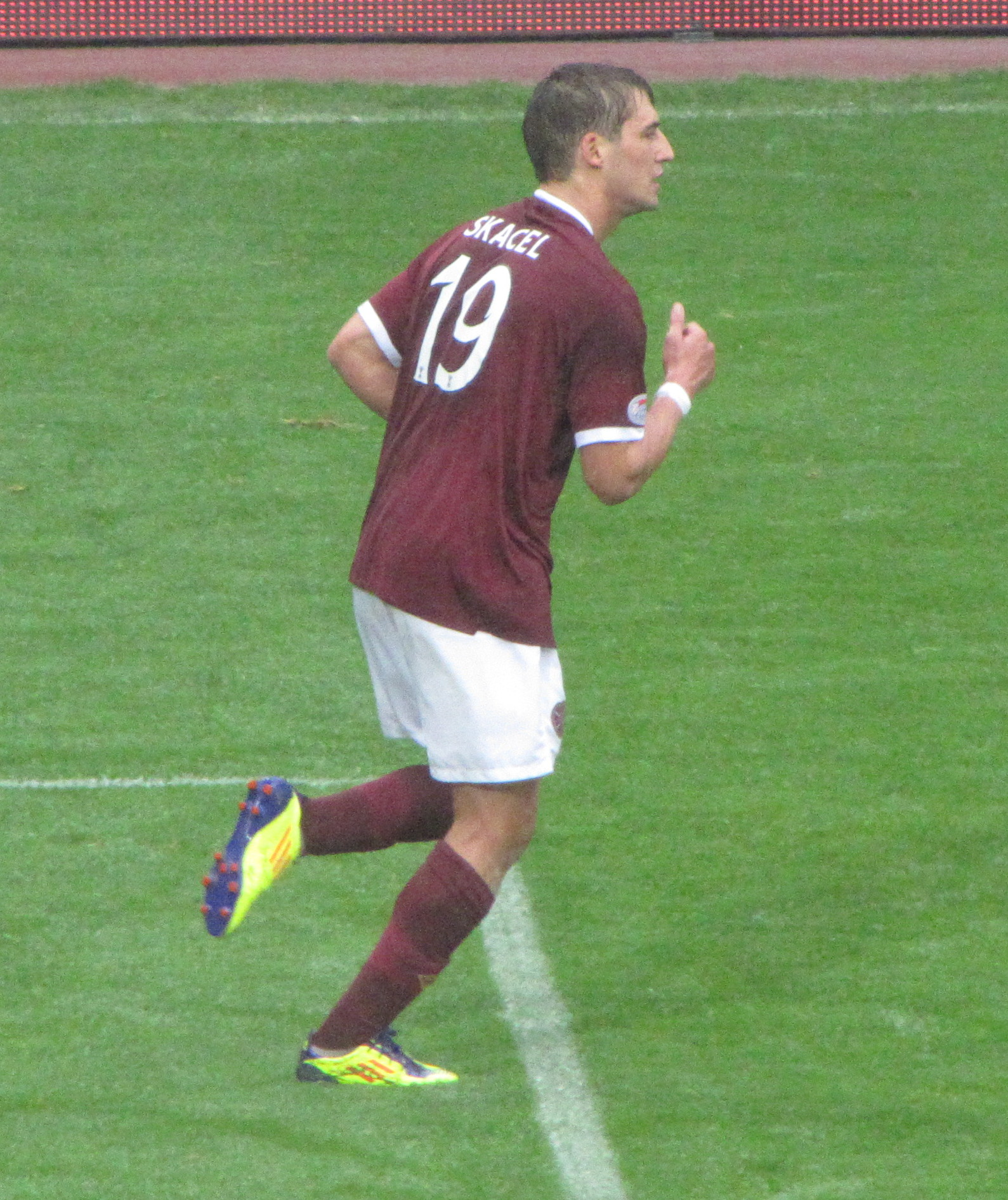 Rudi Skácel - Hearts - Celtic 2:0